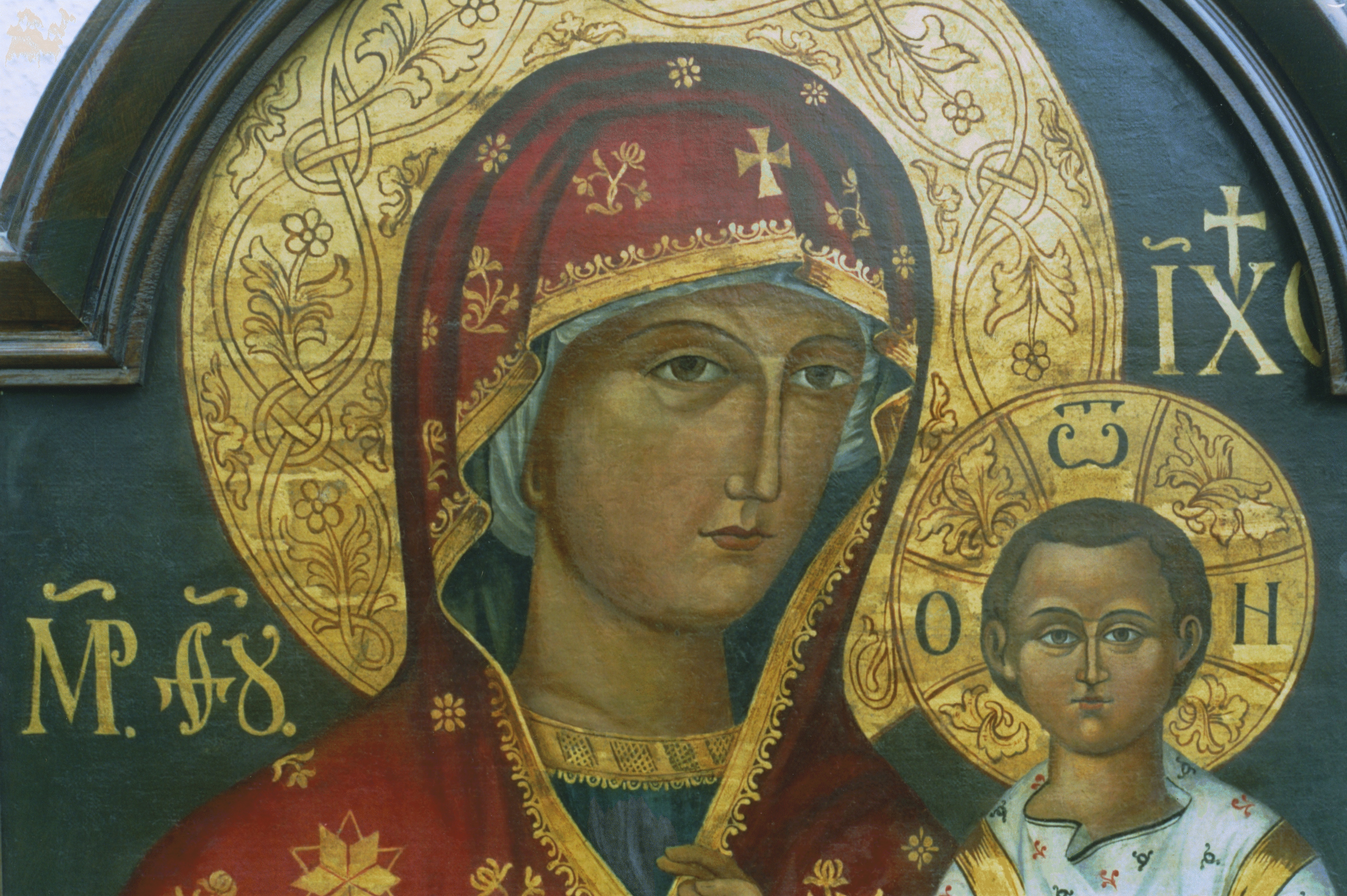 Krásnobrodská čudotvorná ikona. Photo taken by Jozafát Vladimír Timkovič, OSBM